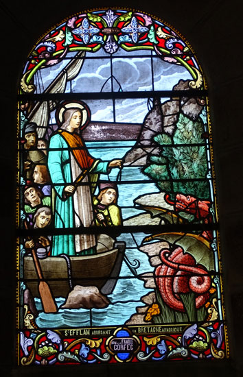 Trezeni. Iliz. Gwerenn livet. Efflam